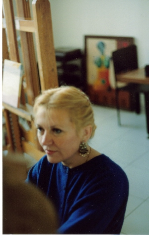 La peintre française Ksenia Milicevic en 1990.